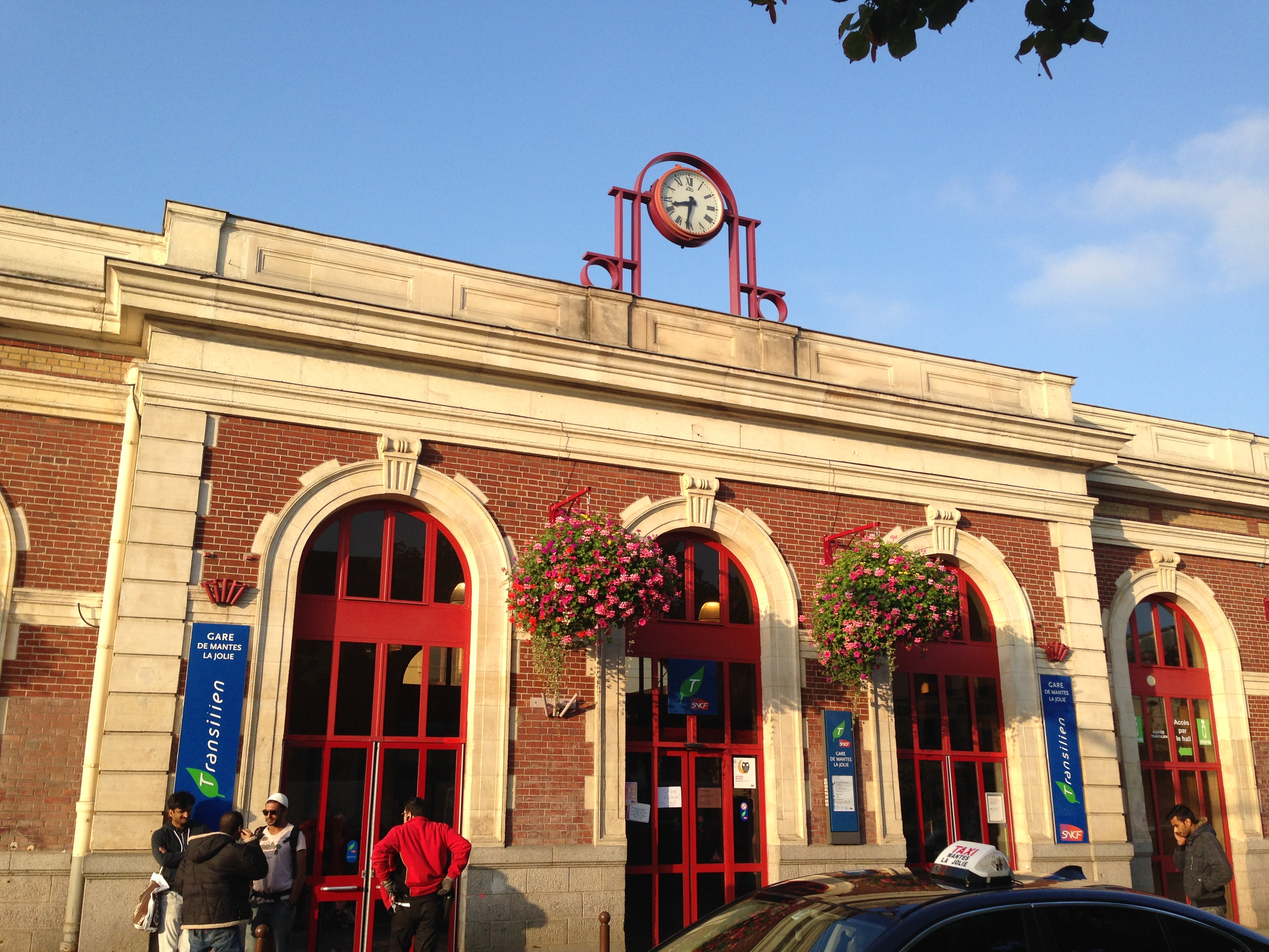 Gare de Mantes-la-Jolie-2014